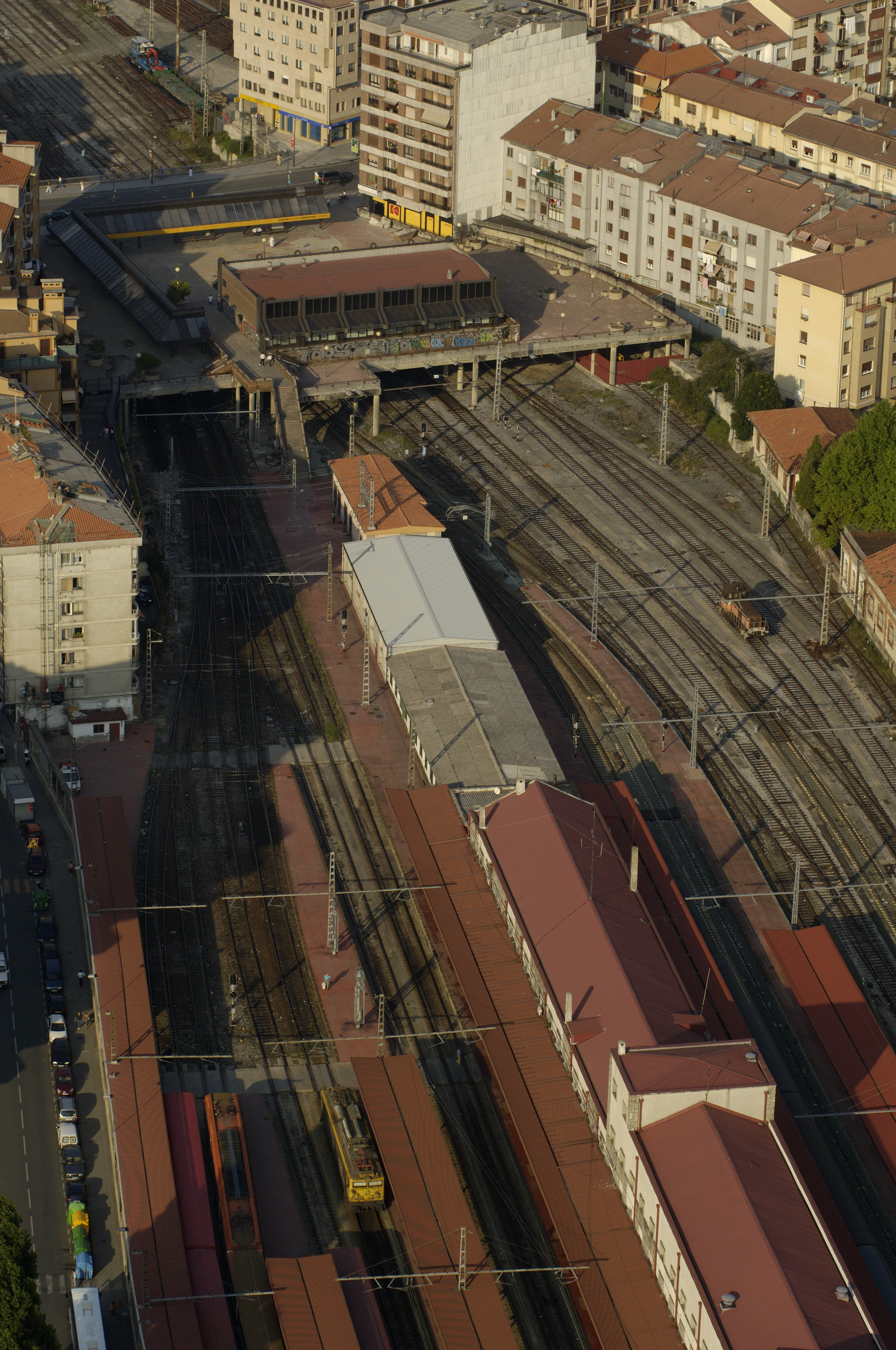 Estación ferroviaria de Irun en 2005